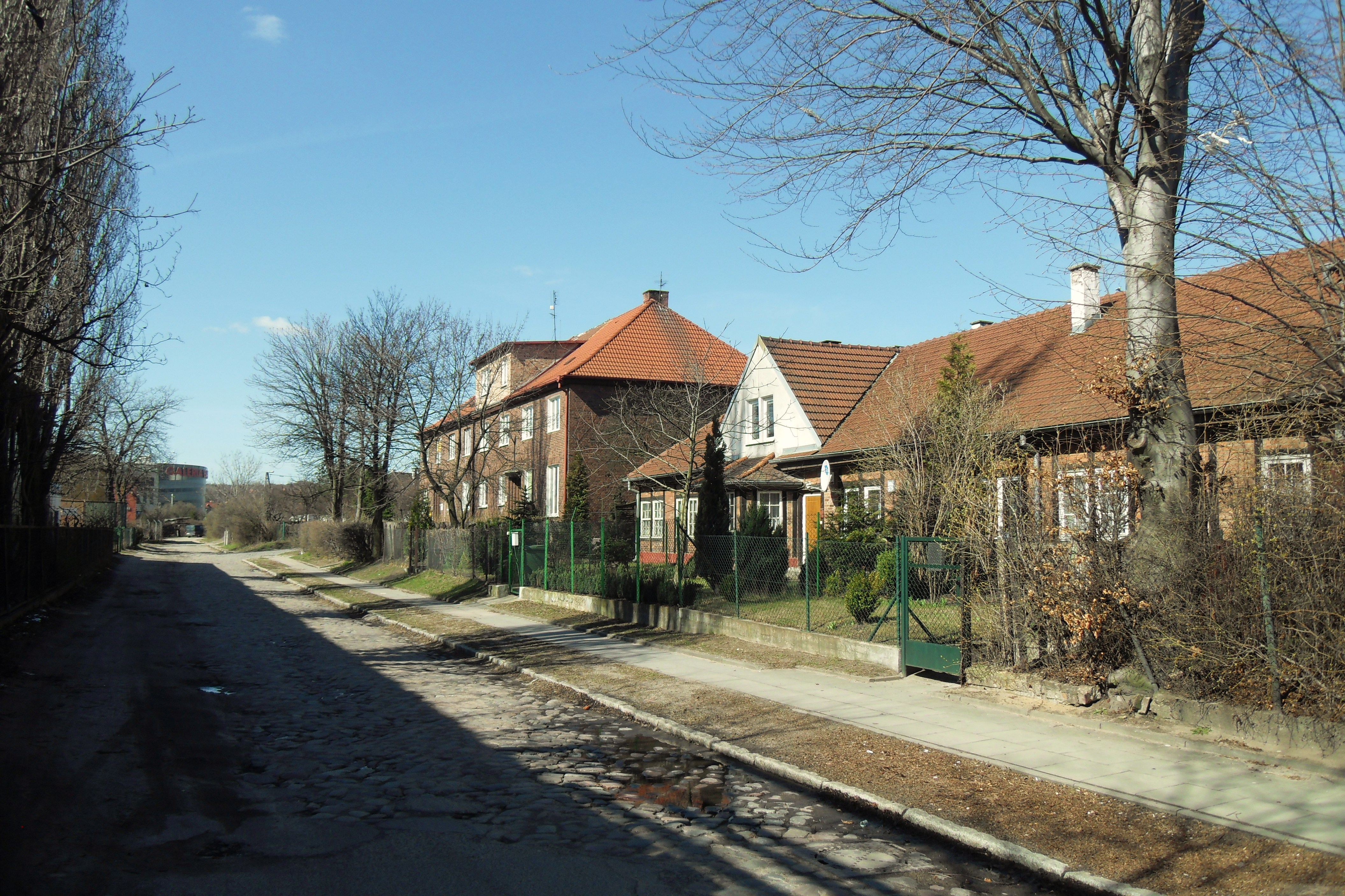 Gdańsk Wrzeszcz Dolny, ul. Nad Stawem.